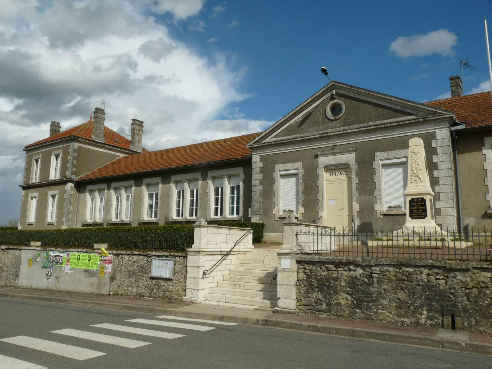 mairie de Manot, Charente, France